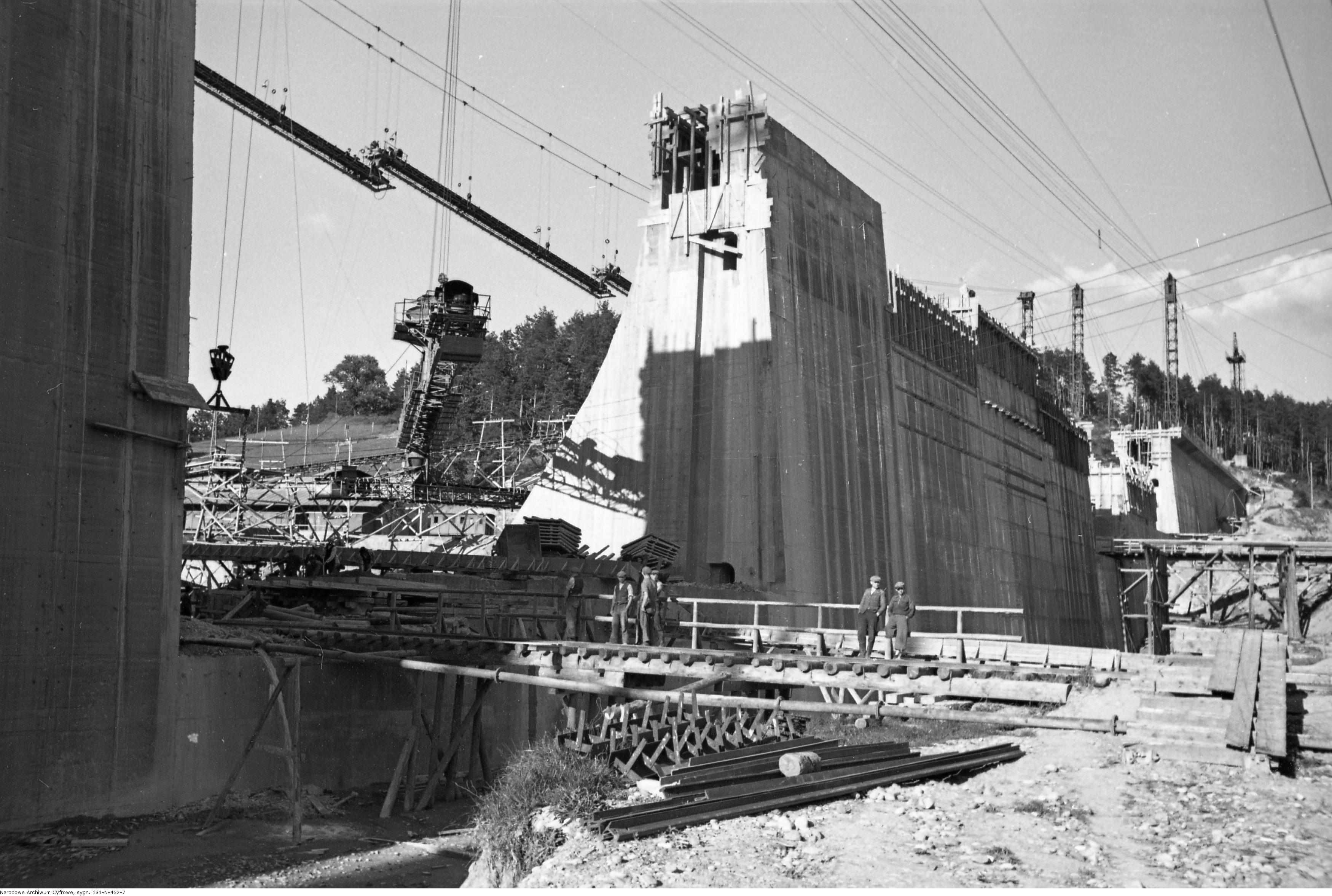 [Fragment zapory podczas budowy.]